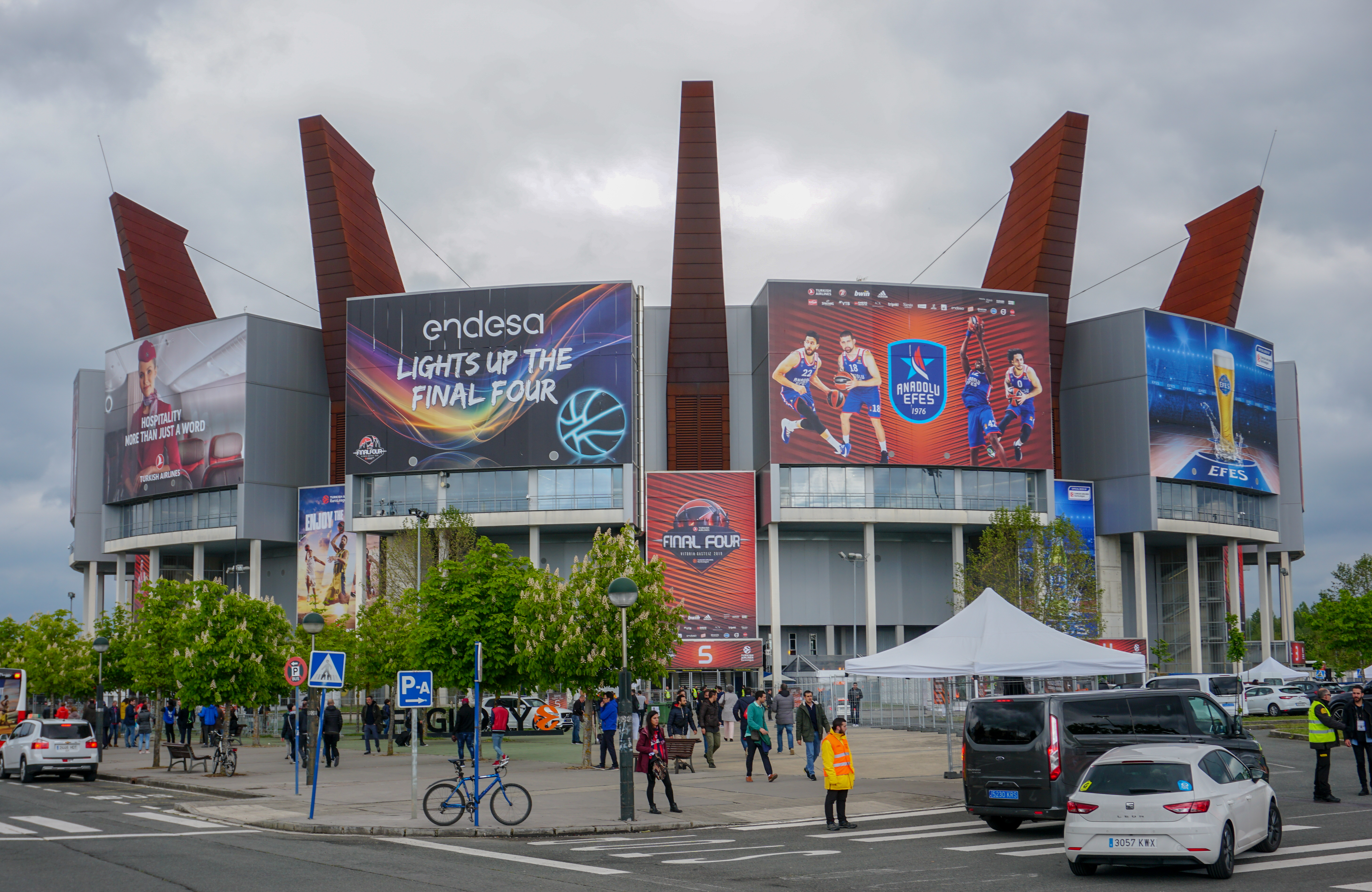 Exterior del Fernando Buesa Arena antes de la final de la Euroliga